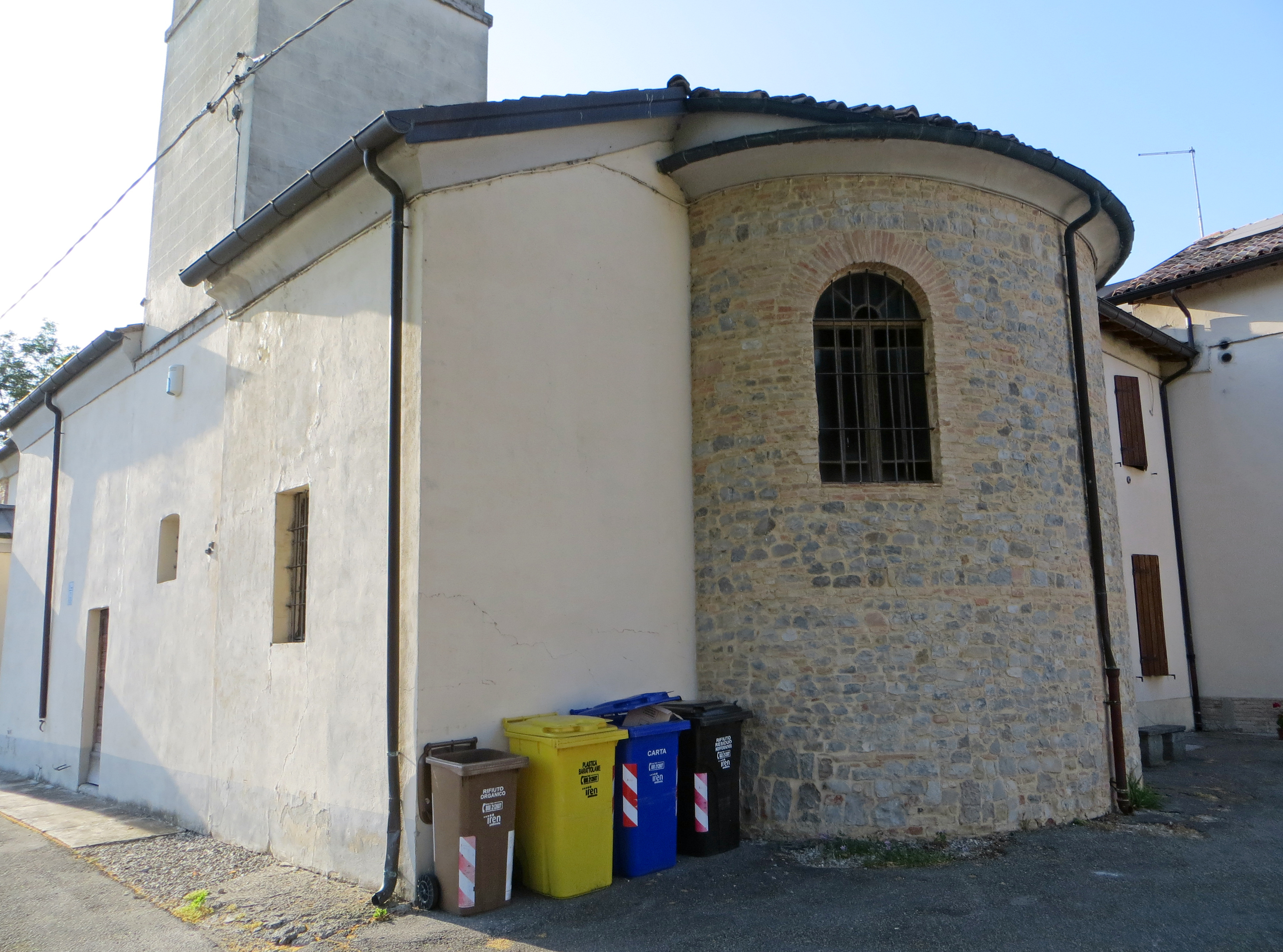 Chiesa di San Biagio (Coloreto, Parma) - abside